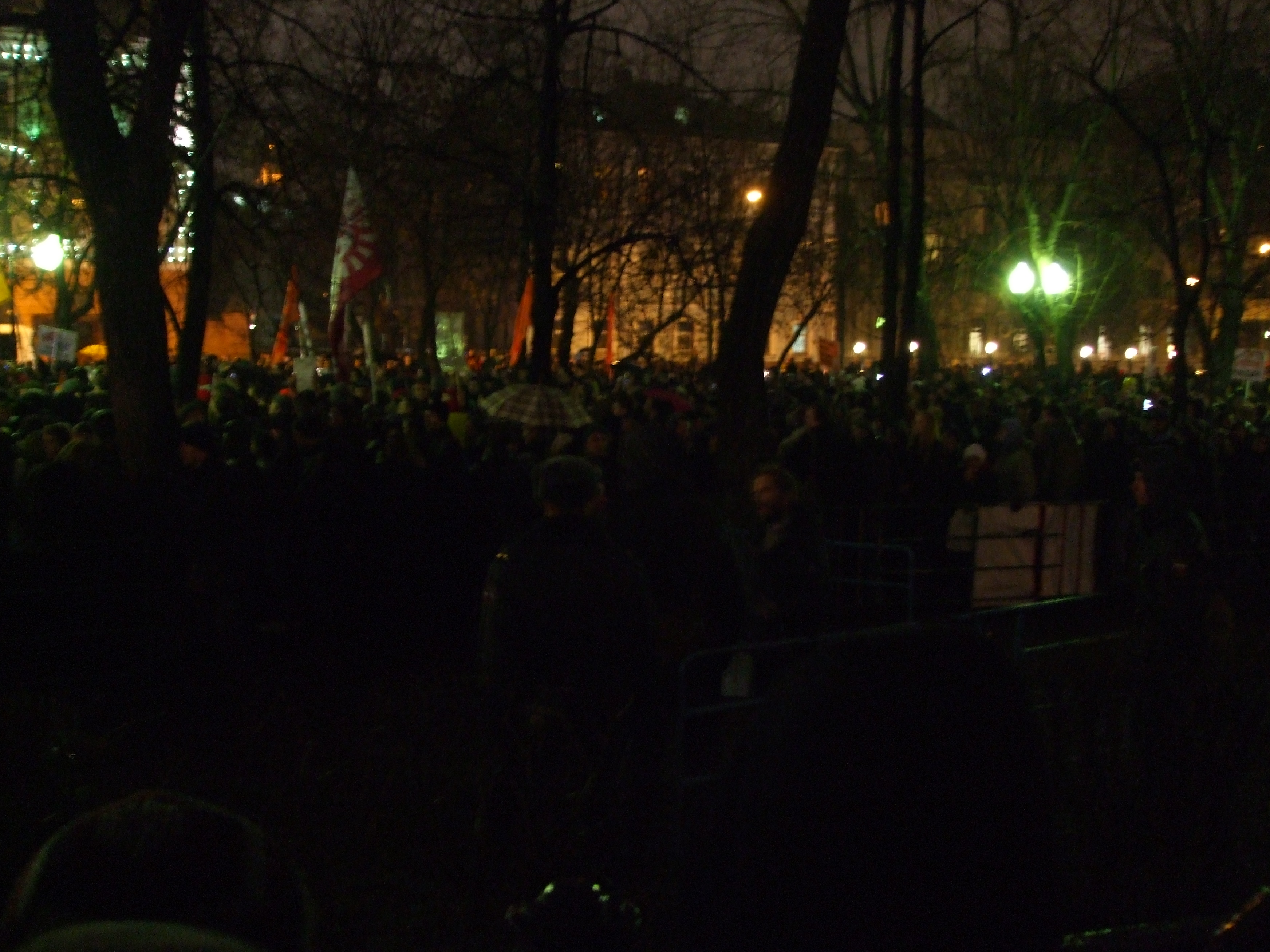 Митинг на Чистых прудах 5 декабря 2011